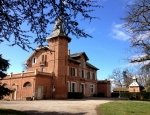 Devant des chambres d'hôtes du Domaine du Buc